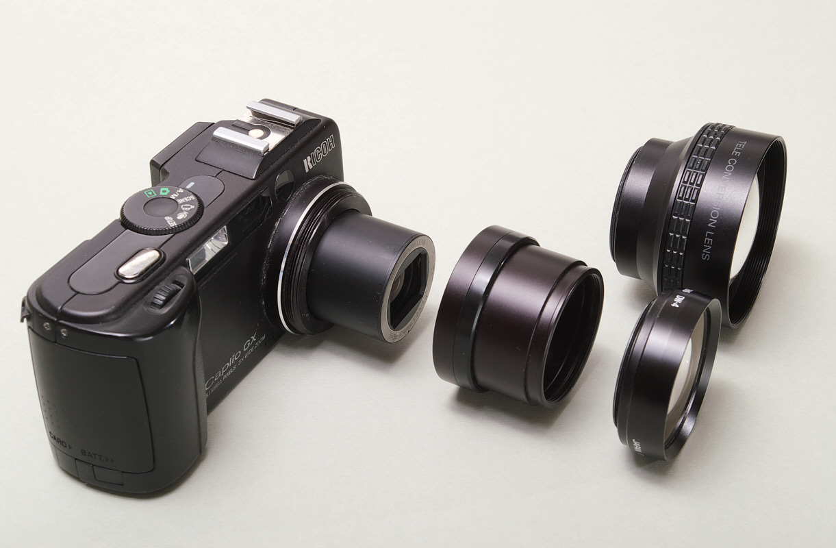 Ricoh Caplio GX Digitalkamera mit Montagetubus für Filter, Streulichblende oder Vorsatzadapter wie den abgebildeten Ricoh DW4 Weitwinkelvorsatz oder Sony-Televorsatz 2x